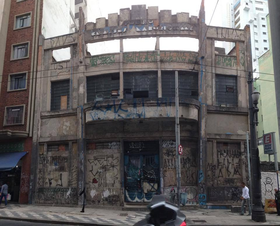 A foto mostra o prédio da Associação Auxiliadora das Classes Laboriosas abandonado, com foco centralizado na parte frontal do local